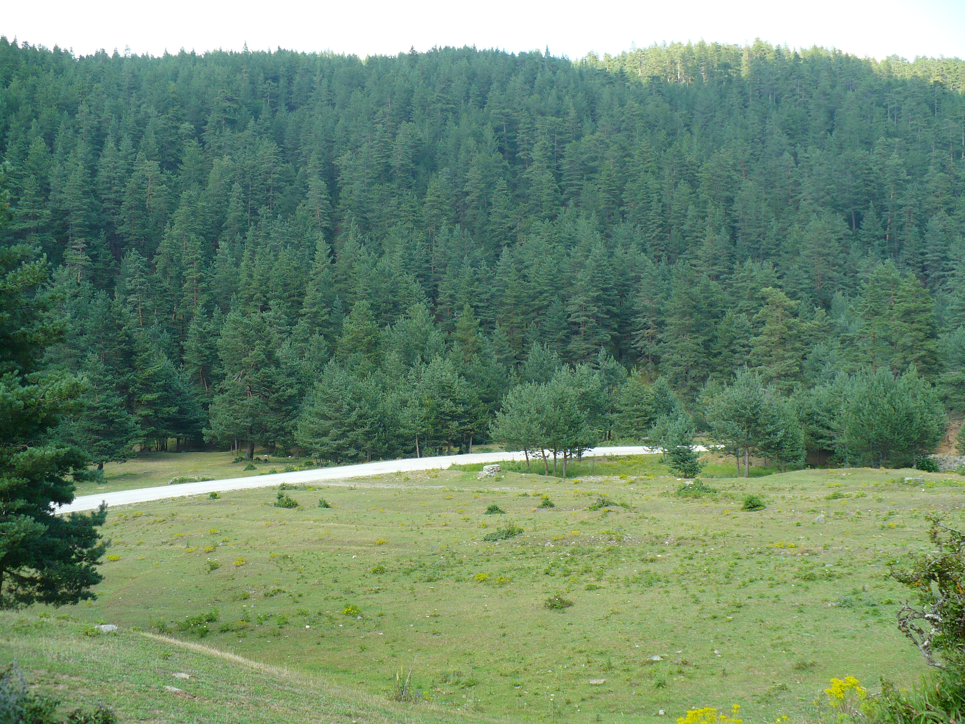 Kunduz ormanı